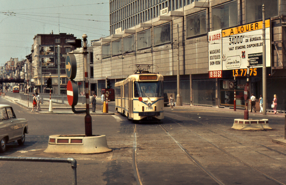 PCC van lijn 103 in Brussel bij het Rogierplein. Rechts is nog het buurtspoorwegspoor te zien die hier zijn keerlus had. De kruisende sporen zijn van de Noord-Zuidlijn, die nu vervangen zijn door de premetro.